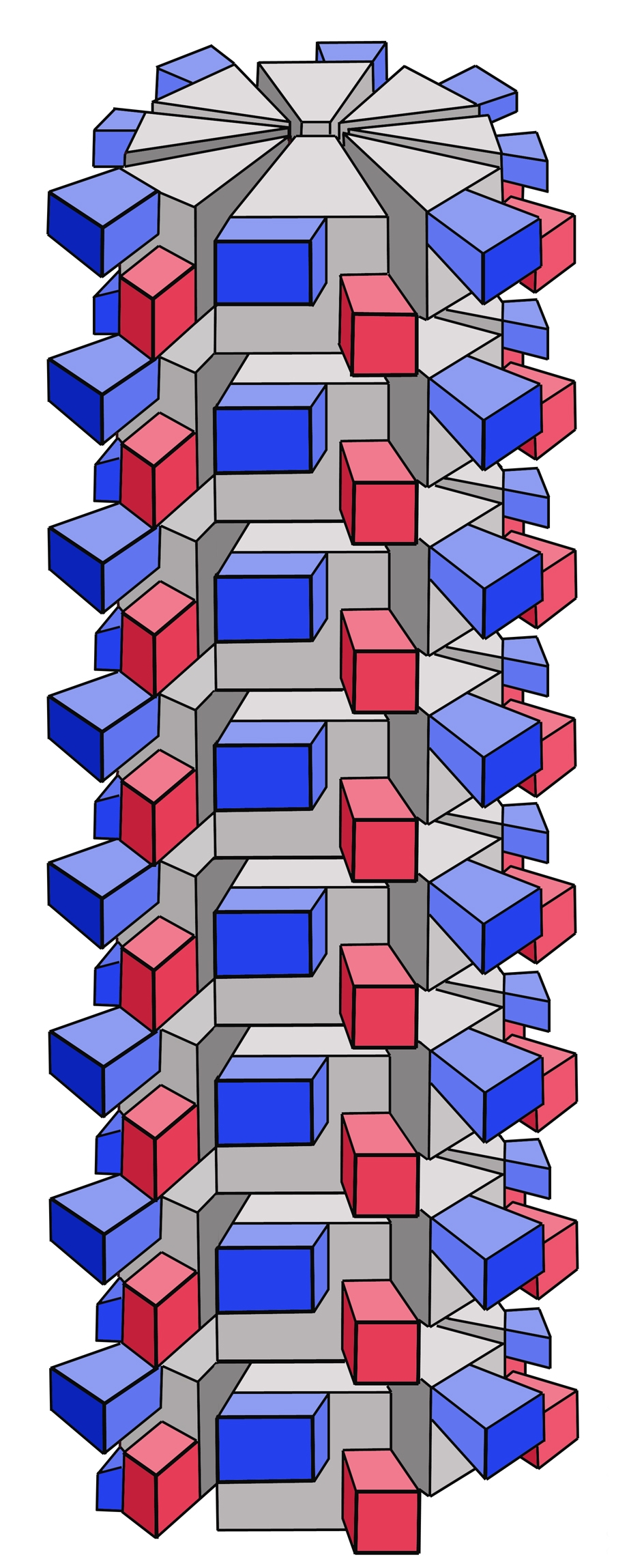 Schematischer Aufbau des helikalen Kapsids des Lily-Mottle-Virus. Konservierte Bereiche des Kapsidproteins (grau), N-Terminus (blau) und C-Terminus (rot). Erweitert und verändert nach dem Schema von Shukla DD, Ward CW: Adv. Virus Res.(1989) 36: S. 273.